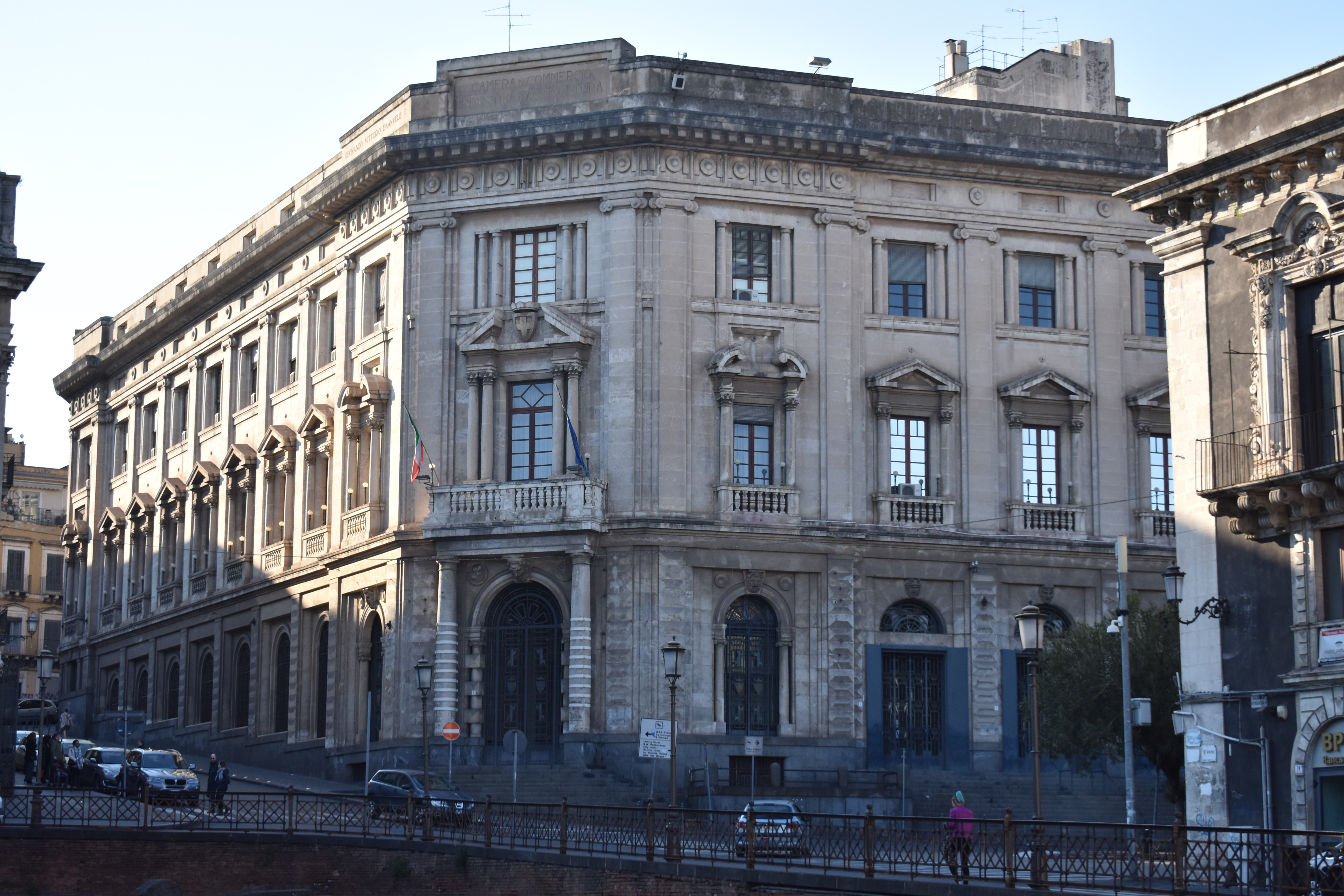 La sede della Camera di Commercio a Catania